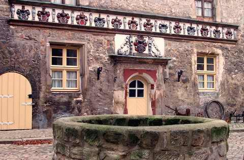 Selbst geschossenes Digitalfoto Juergen Bode Jan 2004 Zum Artikel selbst angefertigt Juergen Bode 15:04, 14. Jul 2004 (CEST)